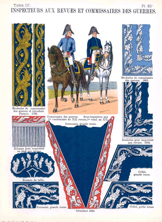 Planche 30 du tome IV des « Uniformes de l'armée française », par le docteur Constant Lienhart et le professeur René Humbert. Inspecteur aux revues et commissaire des guerres en 1803.